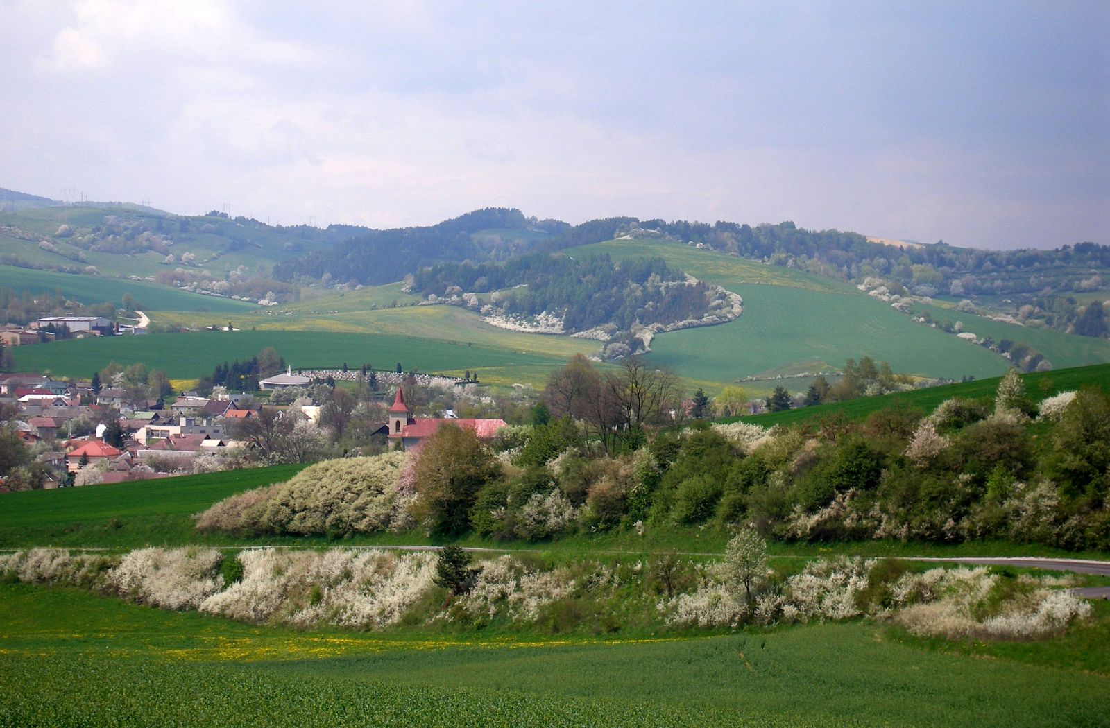 Obec Sedlice okres Prešov región Šariš, Šarišská vrchovina